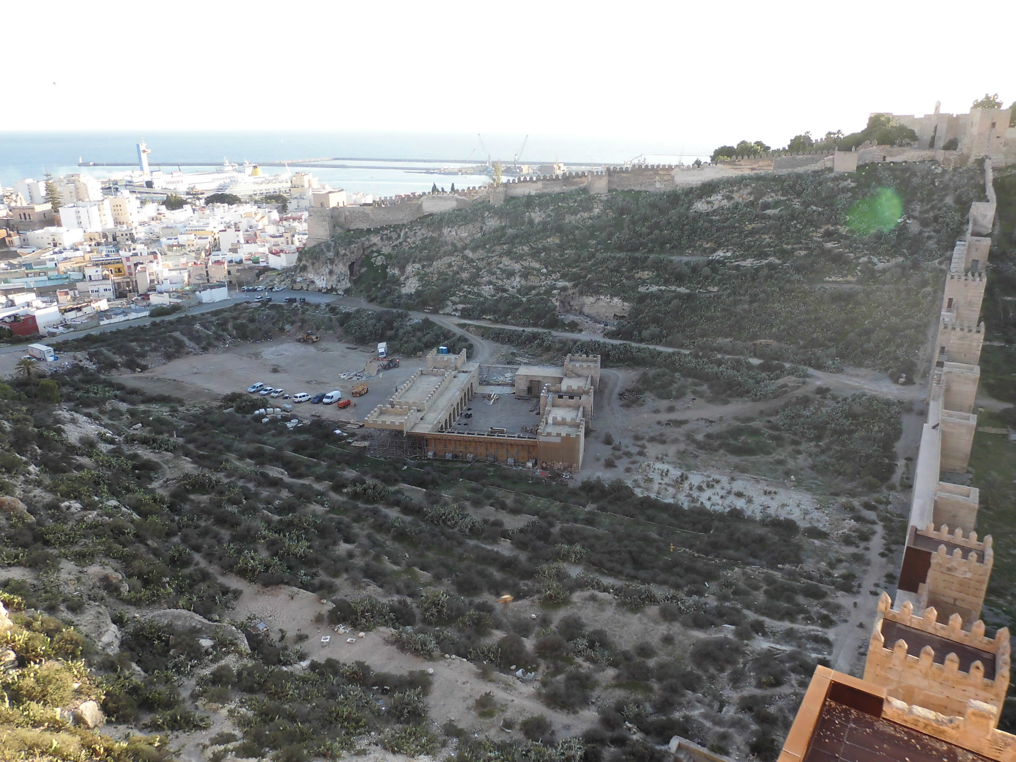 Almería, tierra de cine. Exteriores para el rodaje de la película Resucitado, junto a la Alcazaba de Almería.